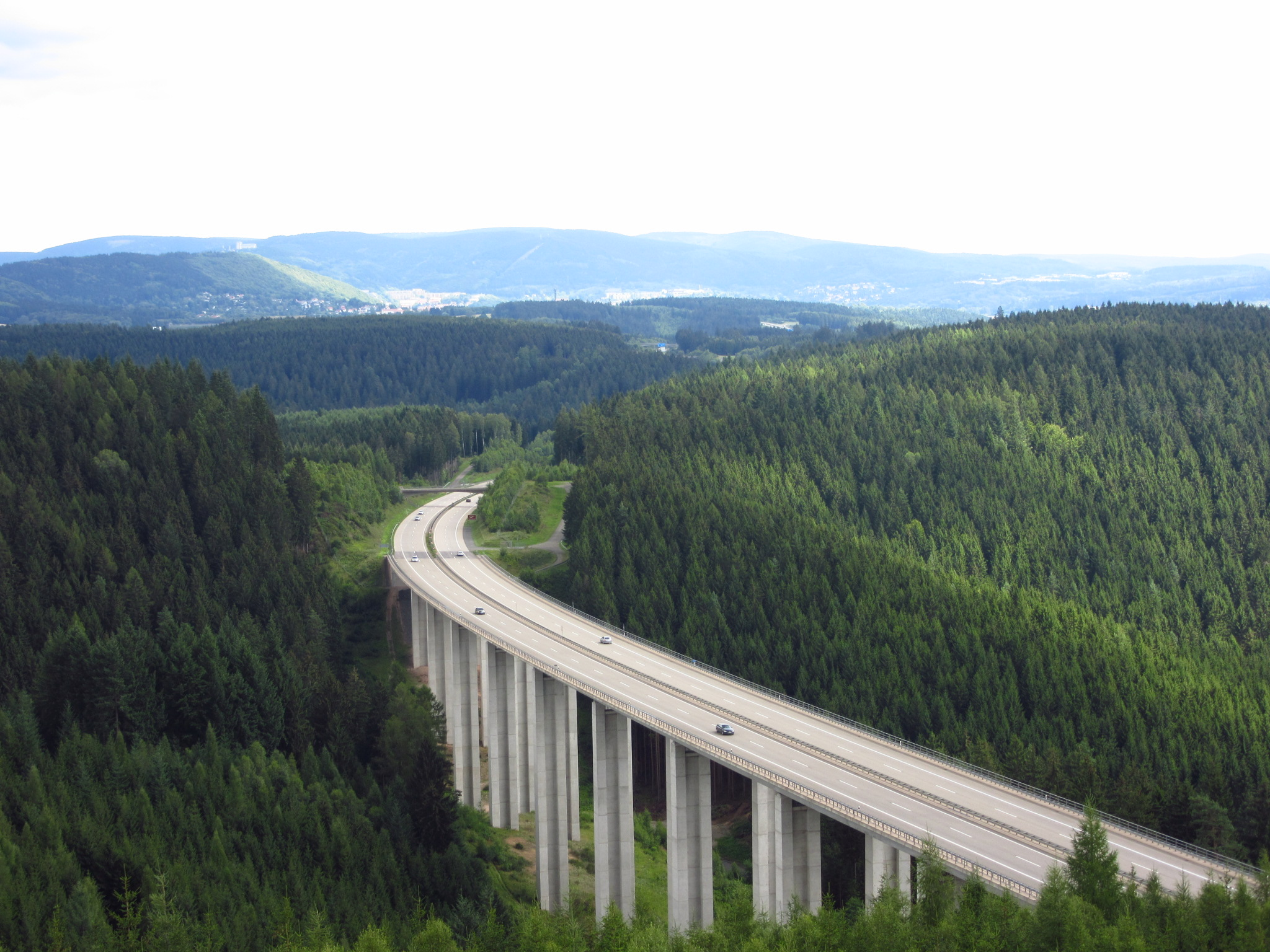 Talbrücke Schafstalgrund der Bundesautobahn A71 bei Dietzhausen